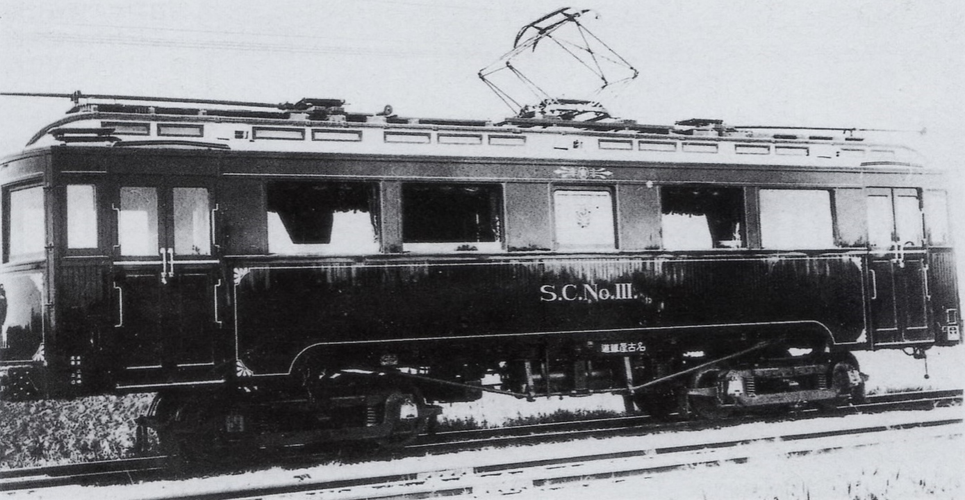 名鉄トク3号